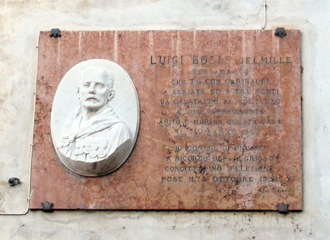 Figline Valdarno